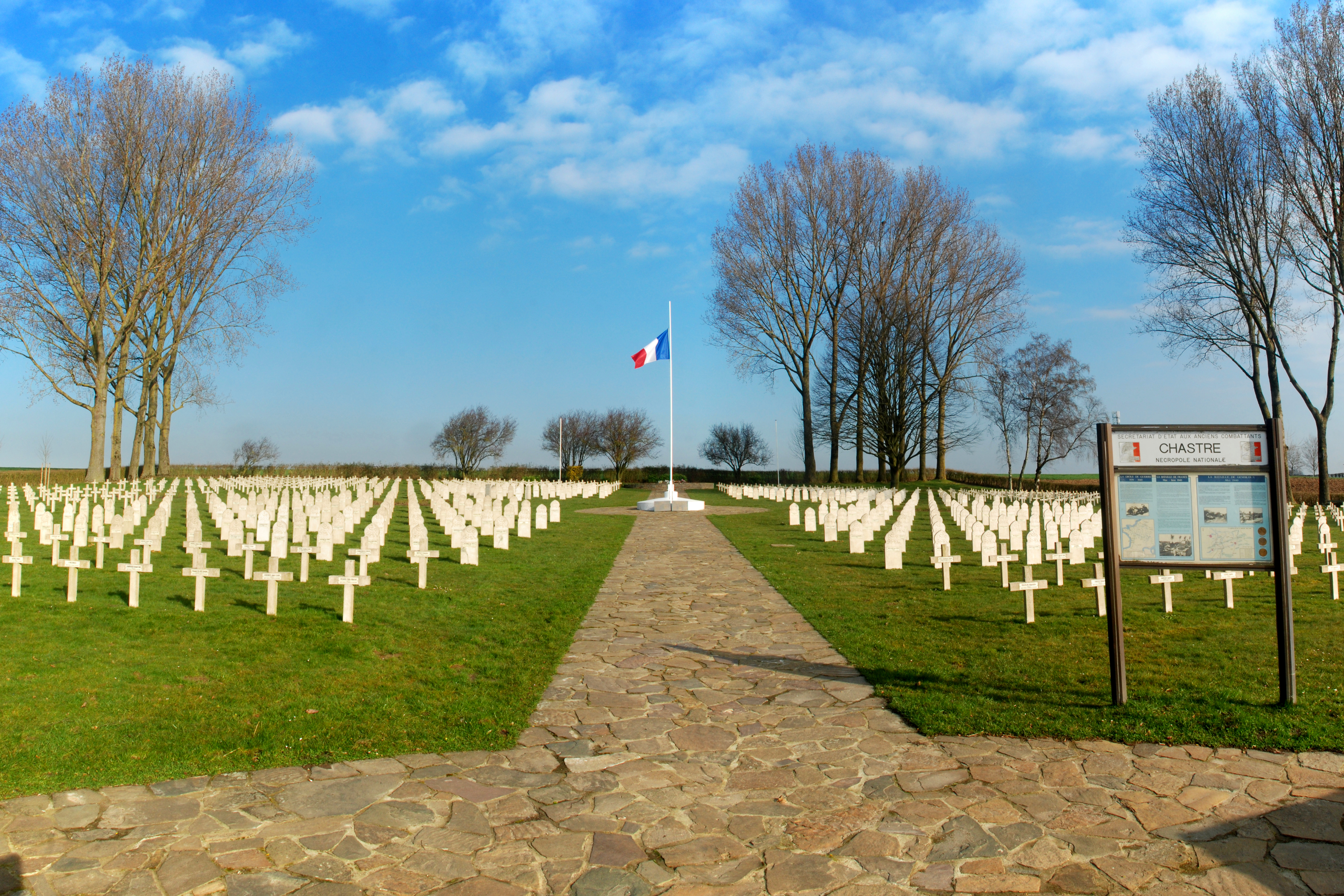 Belgique - Brabant wallon - Chastre - Nécropole française